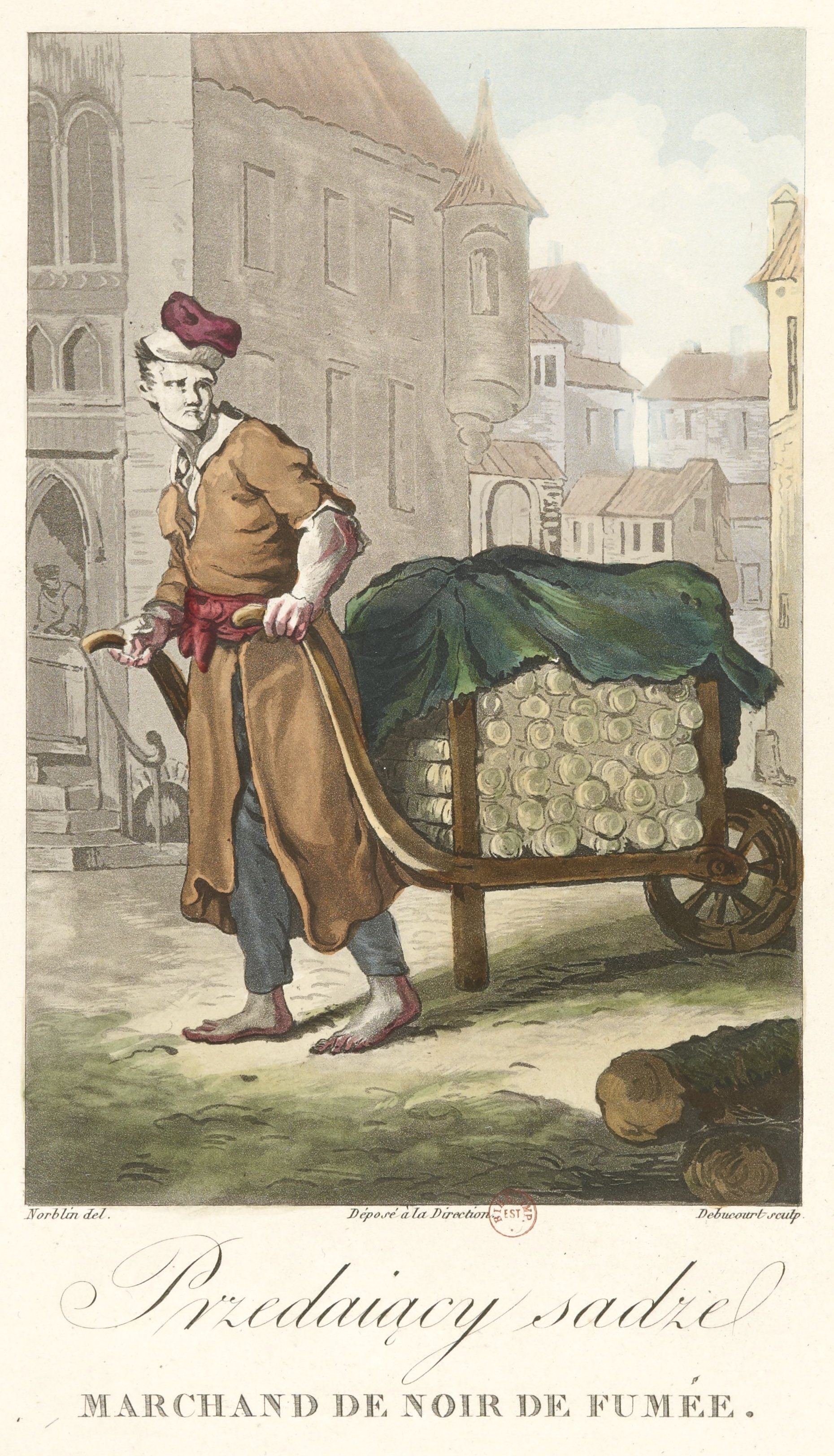 Торговец сажей